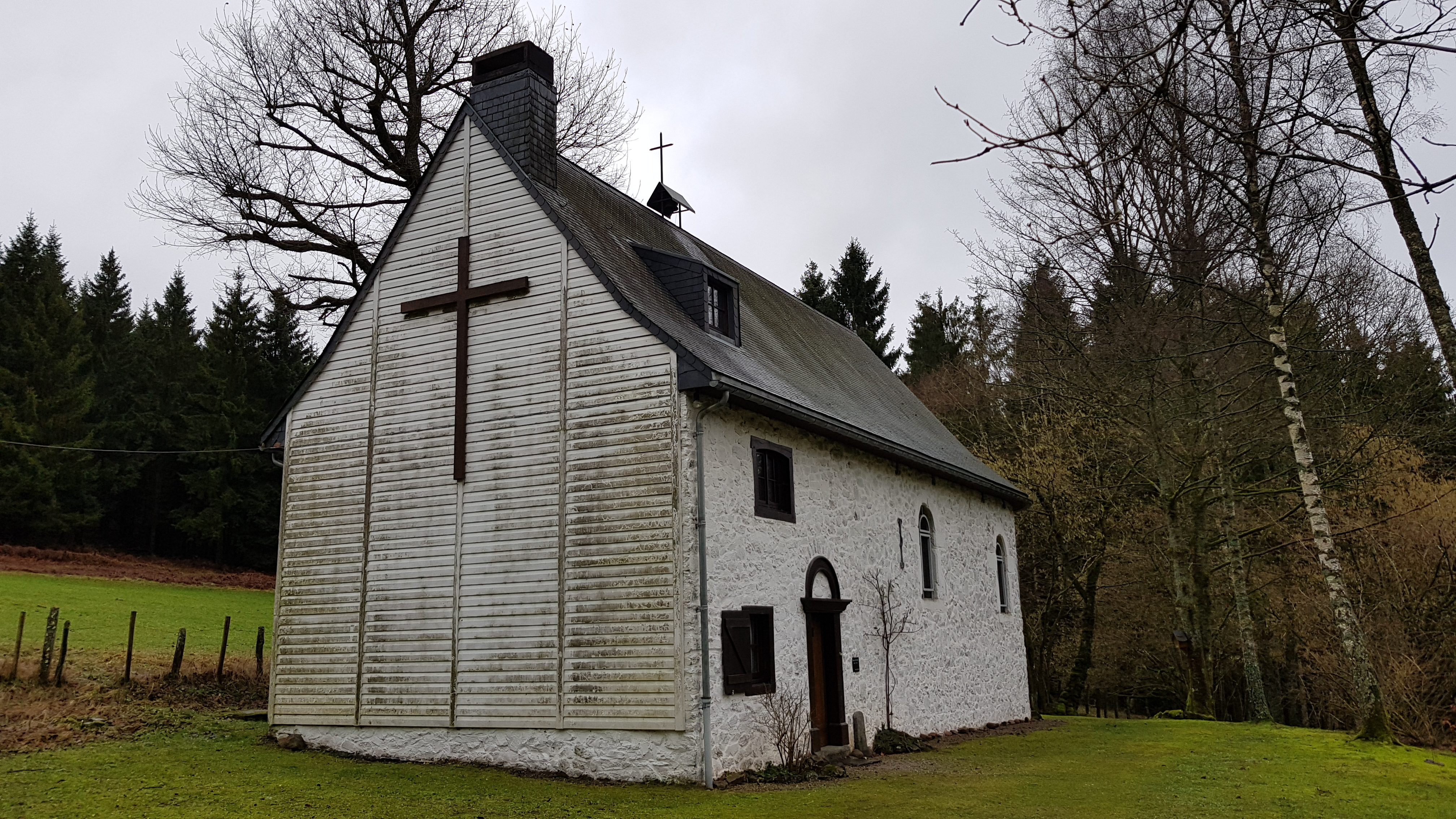 Kluizenarij van Sint-Antonius / Kluizenarij van Bernister, Malmedy, België